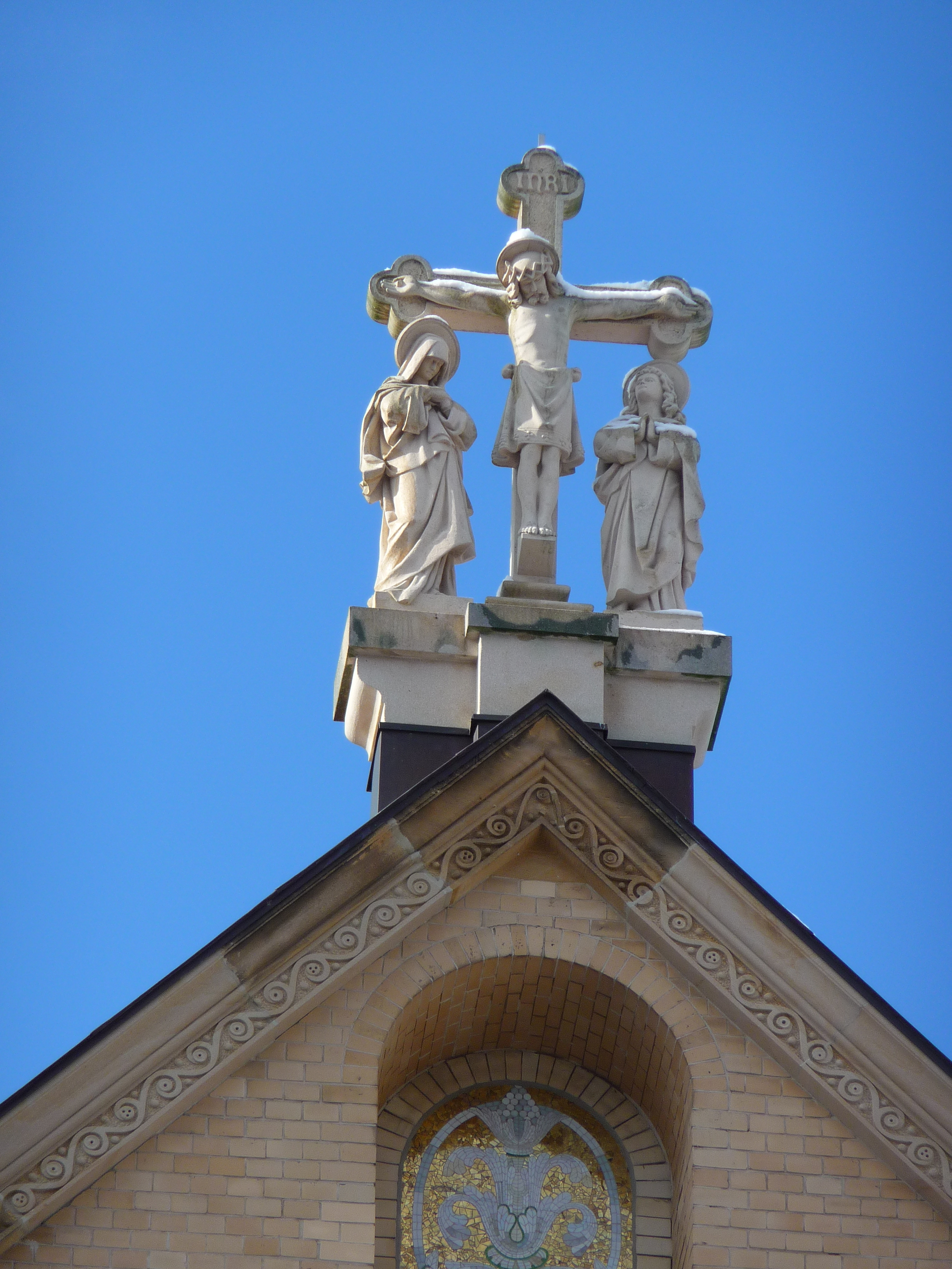 Detailaufnahme Dach der katholischen Kirche St. Raphael in Heidelberg-Neuenheim (Deutschland)